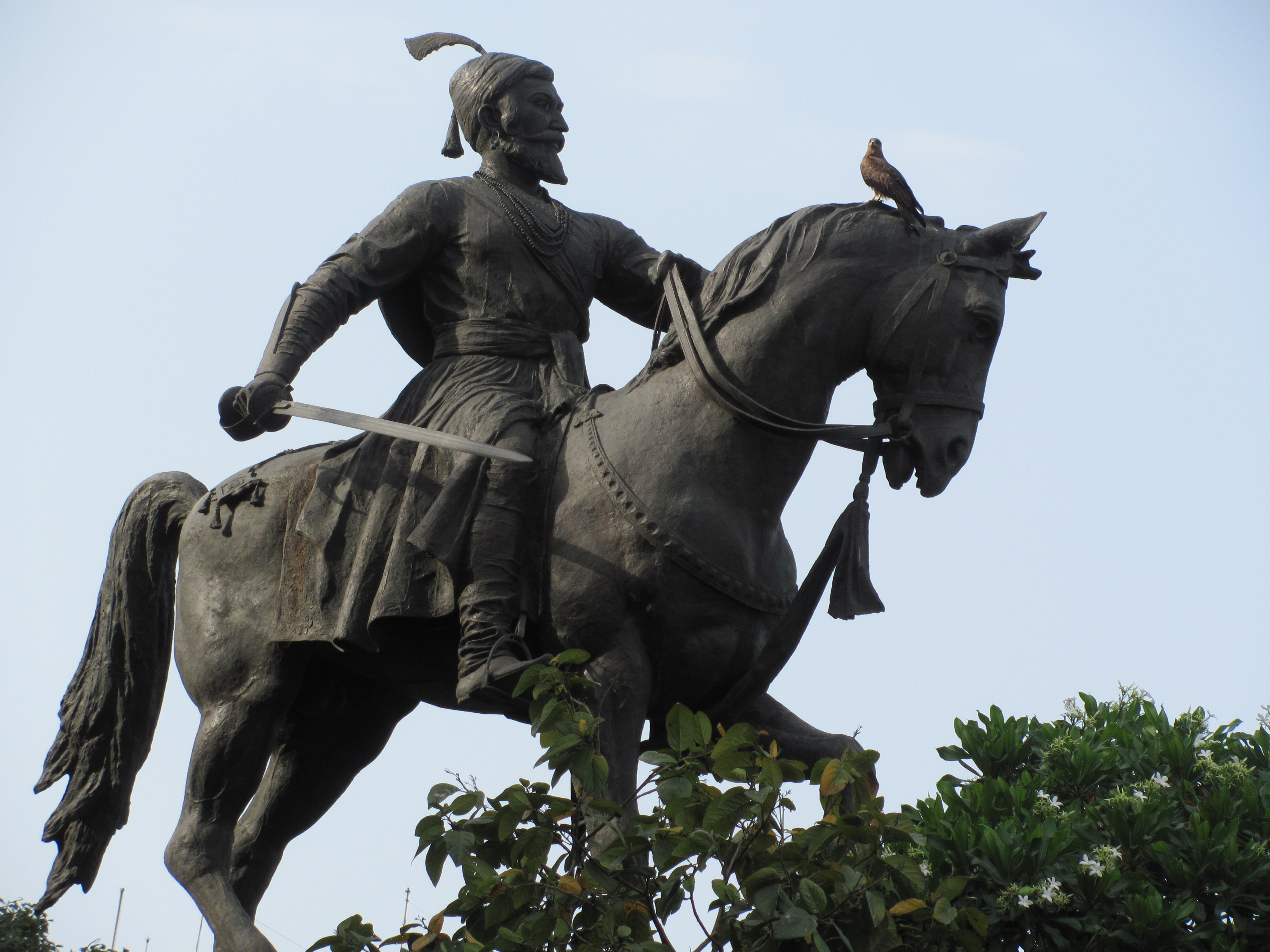 ശിവാജി പ്രതിമ മുംബൈ